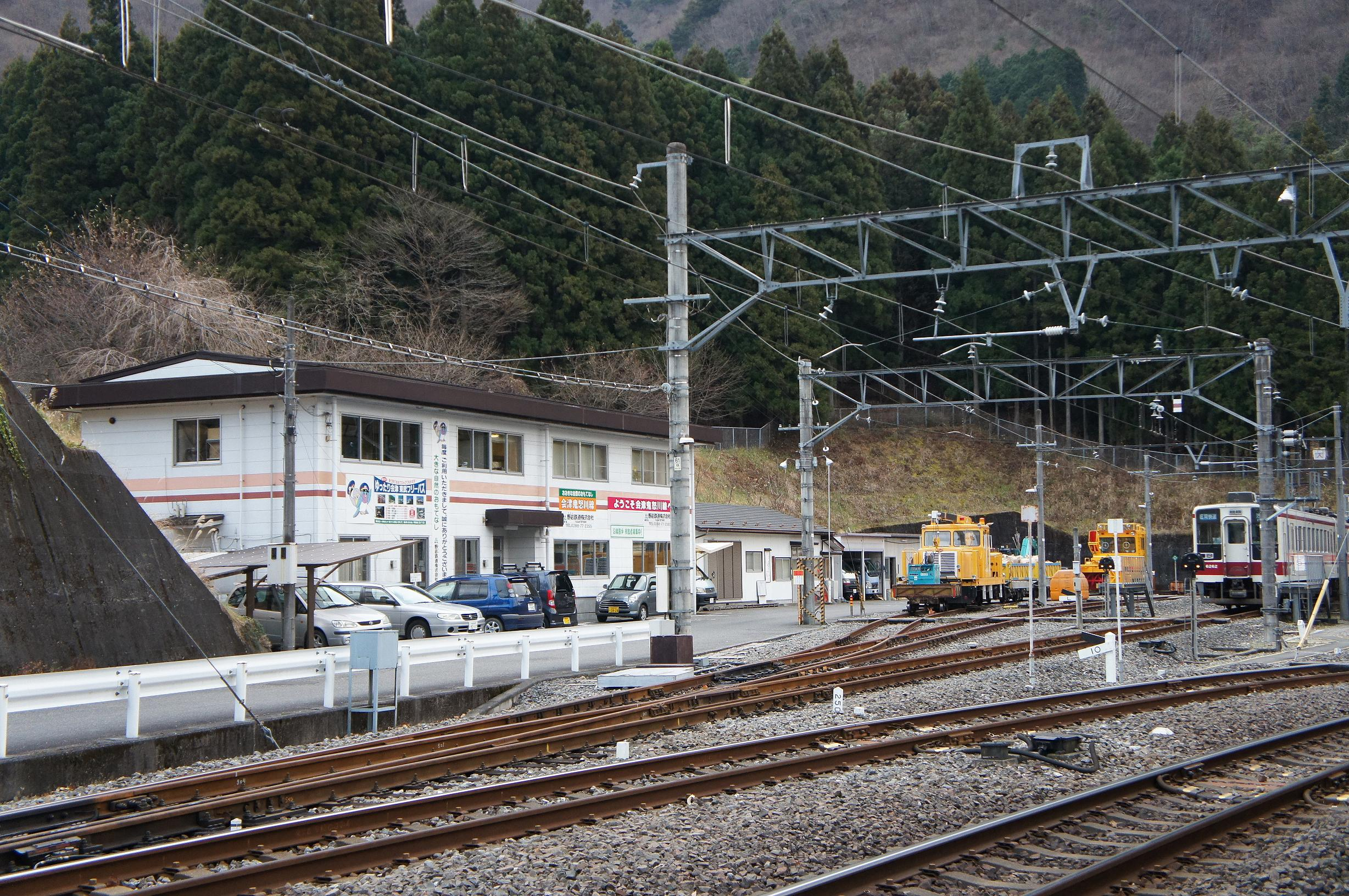 野岩鉄道本社と新藤原駅構内の留置線。